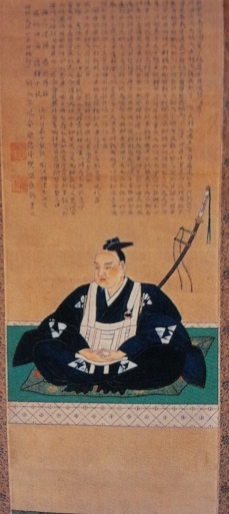 来島(久留島)通康の肖像。